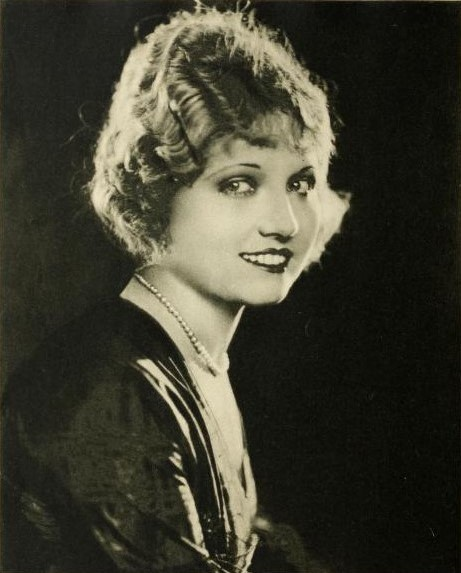 Eva Novak